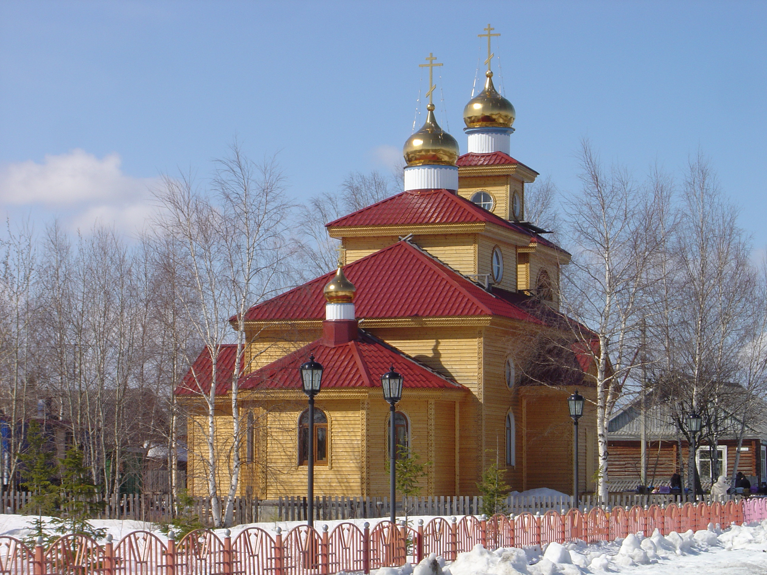 Храм в честь иконы Казанской Божьей Матери в селе Угут (Сургутский район Ханты-Мансийского автономного округа). Построен в начале 2000х годов. Освящен на Пасху в 2008 году. Снимок сделан в день освящения храма.